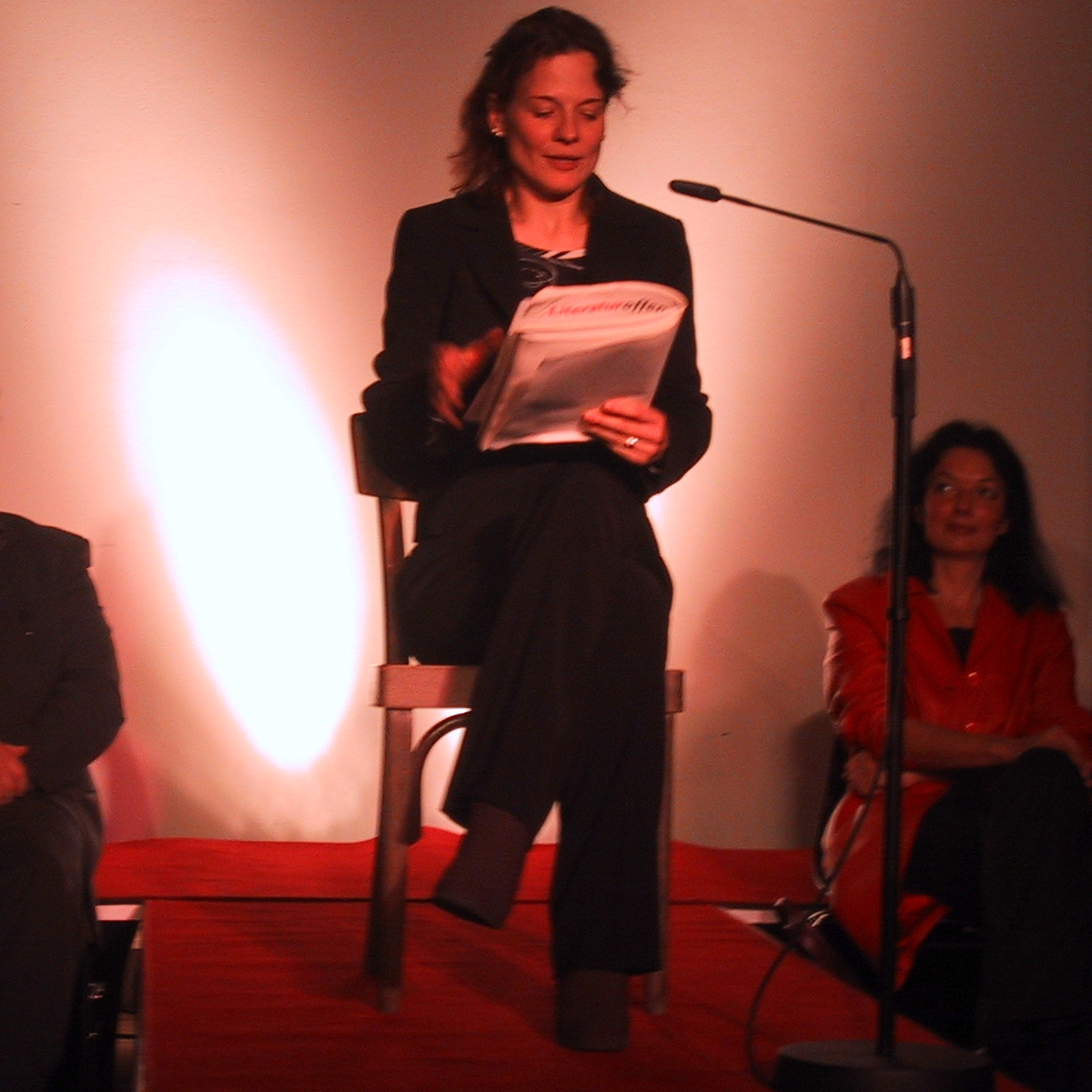 Monika Wogrolly in: "Wir wollen niemals auseinandergehen. Die große GAV-Revue". Literaturhaus Graz (2003)